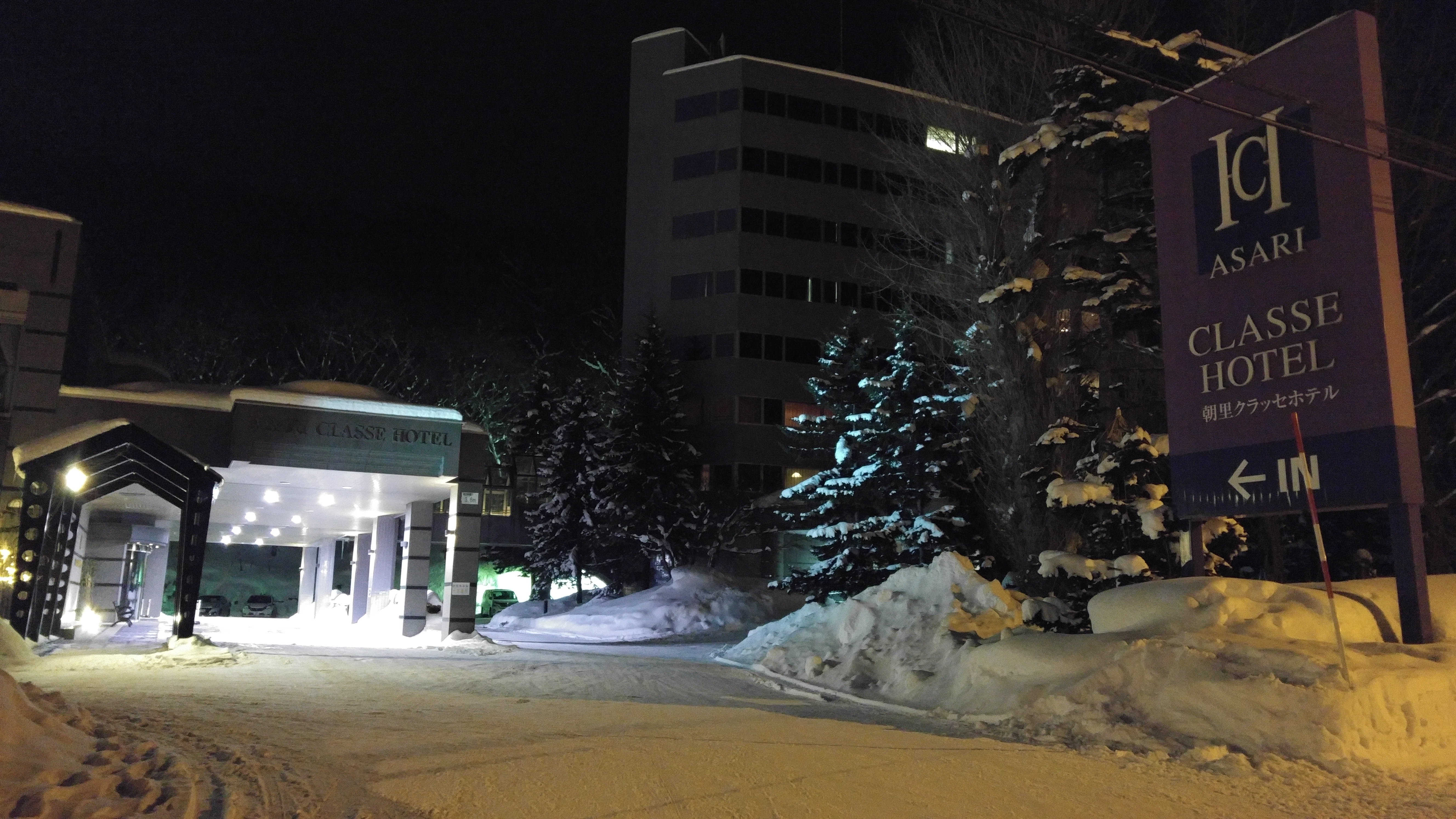 小樽朝里クラッセホテル